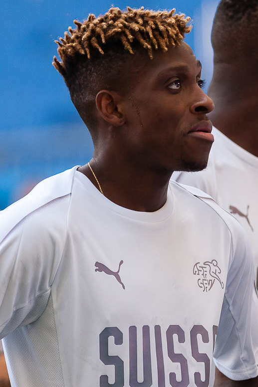 Бразилия и Швейцария готовятся к очной встрече на «Ростов Арене»